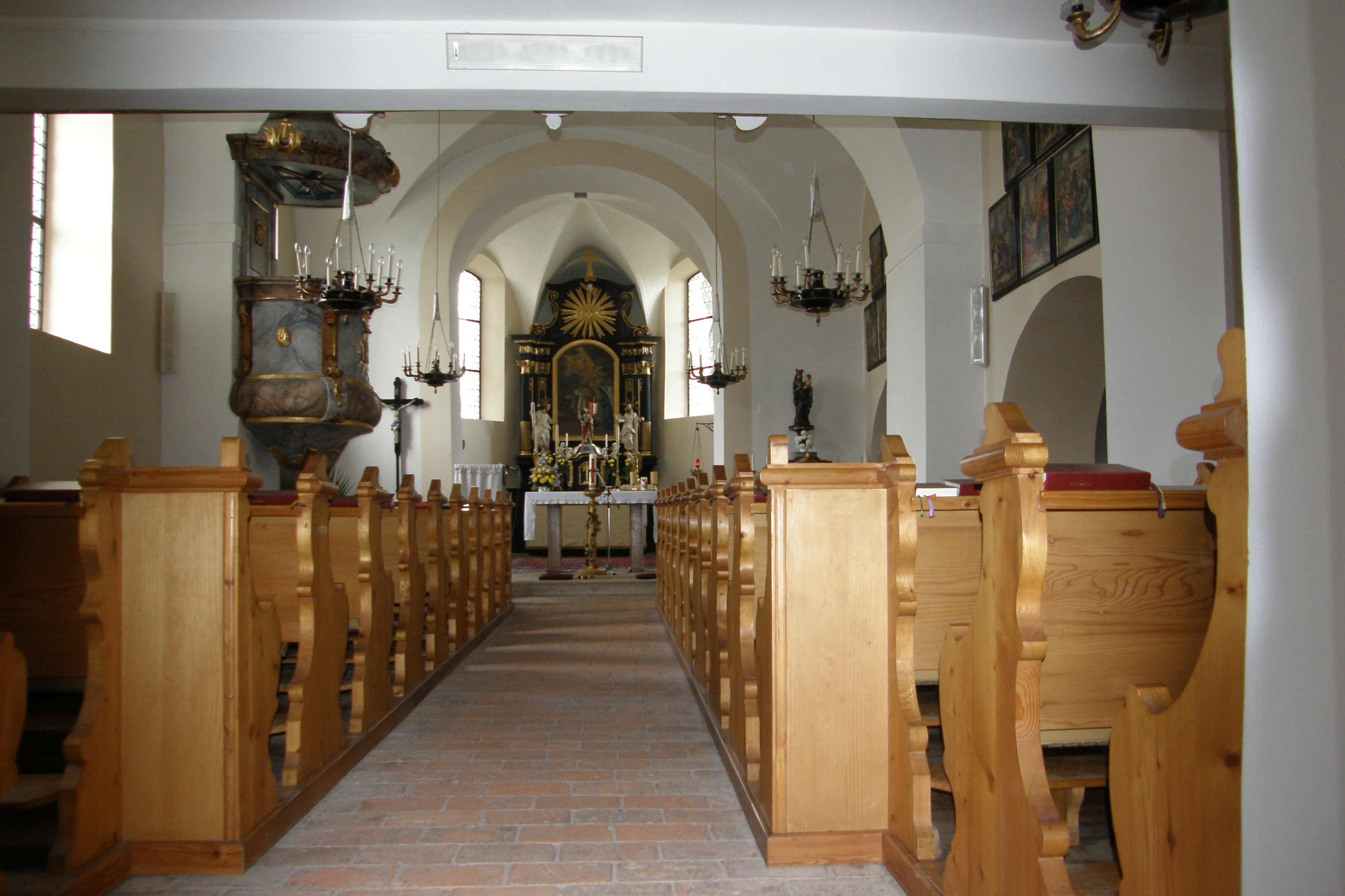 Kath. Pfarrkirche hl. Nikolaus